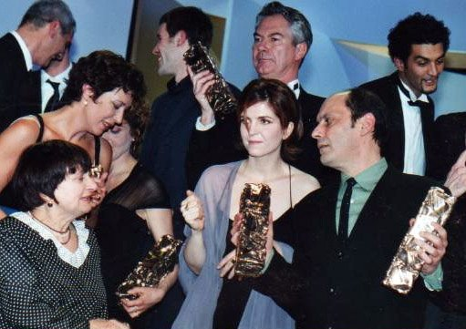 Parmi d'autres : Karin Viard, Anne Alvaro, Agnès Varda, Jalil Lespert, Agnès Jaoui, Jean-Pierre Bacri, Ramzy Bédia, à la 26e cérémonie des César